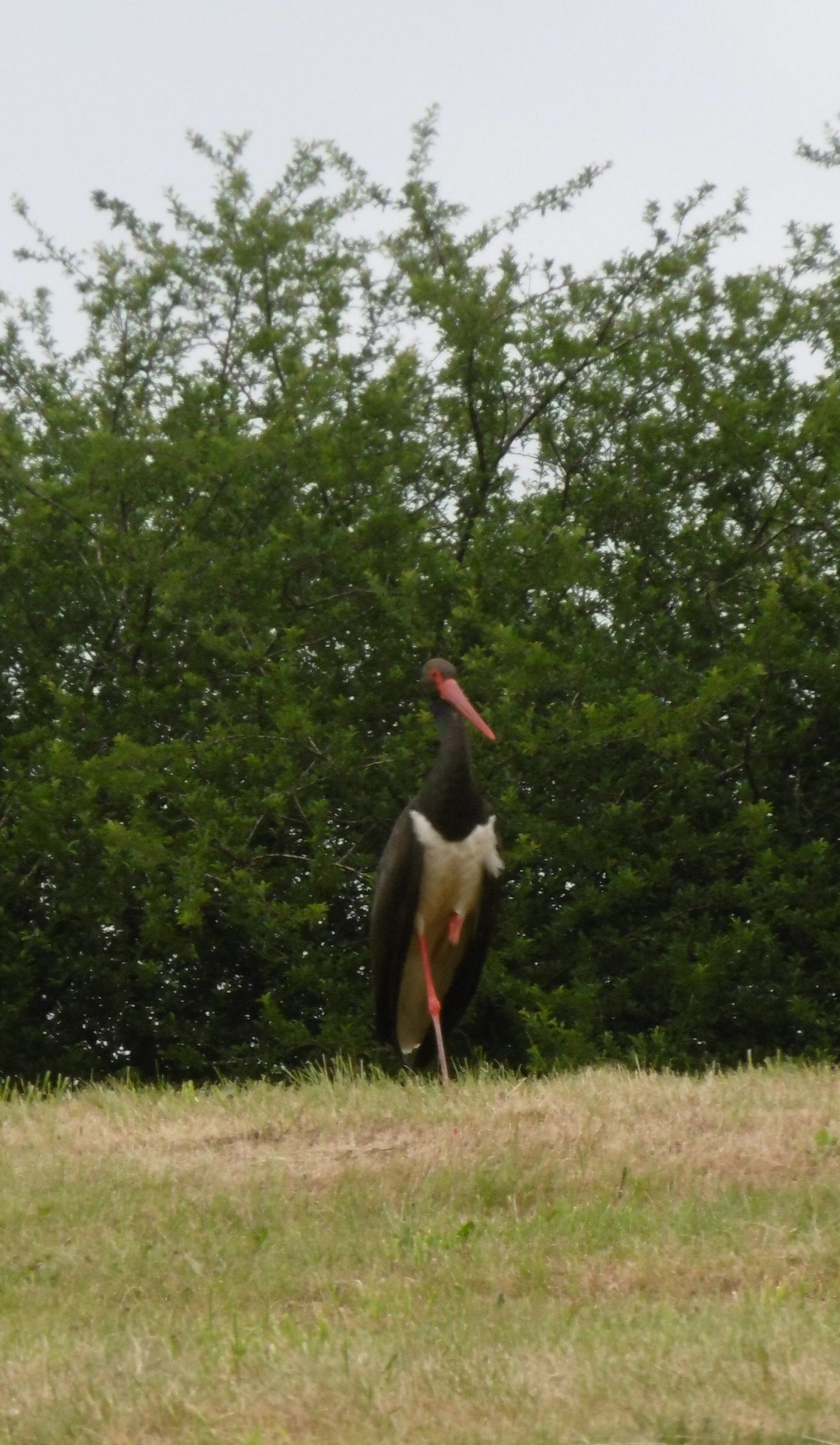 Adulter Schwarzstorch im Naturschutzgebiet Berkmecke-Talsystem (Stadt Winterberg, HSK, NRW, Deutschland).